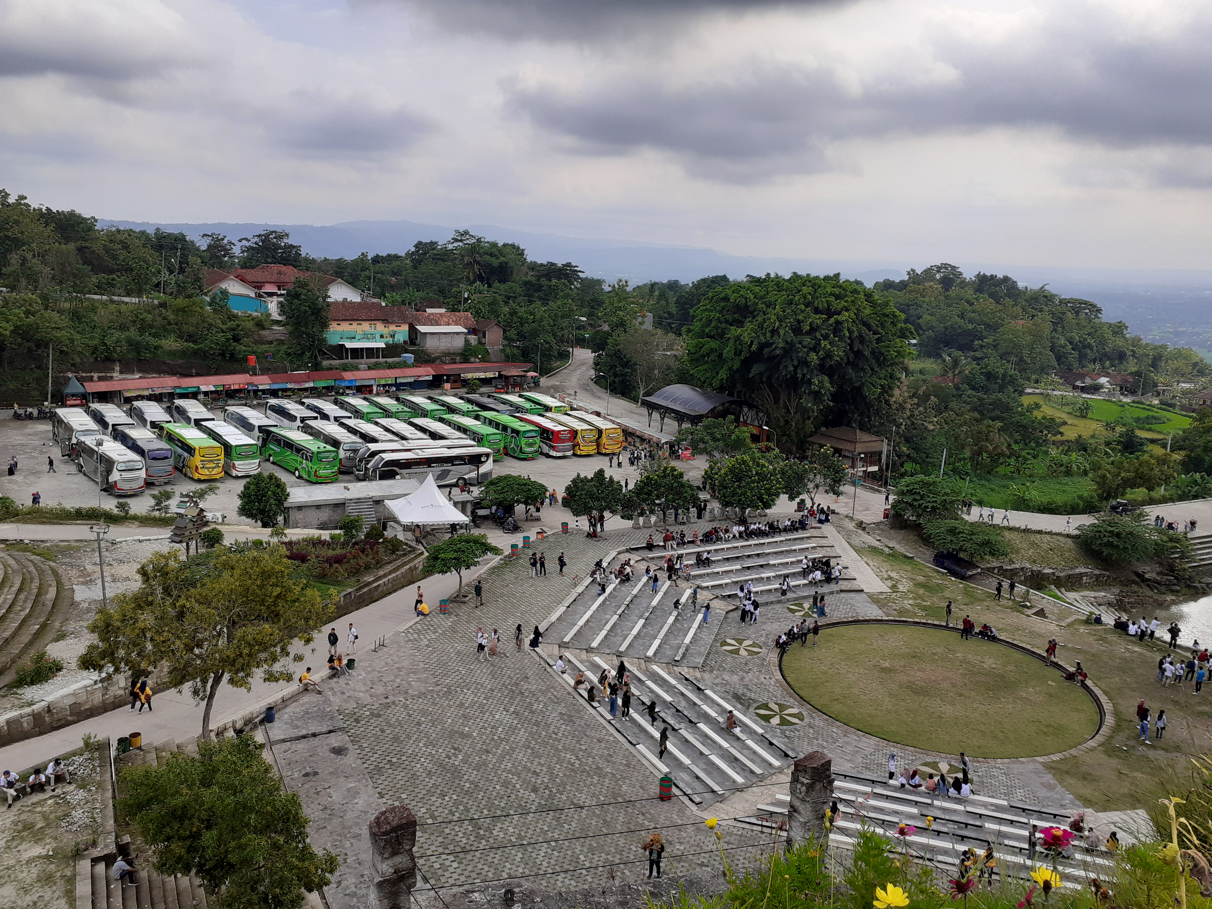 Lahan parkir dan amfiteater yang tersedia di obyek wisata Tebing Breksi di Yogyakarta